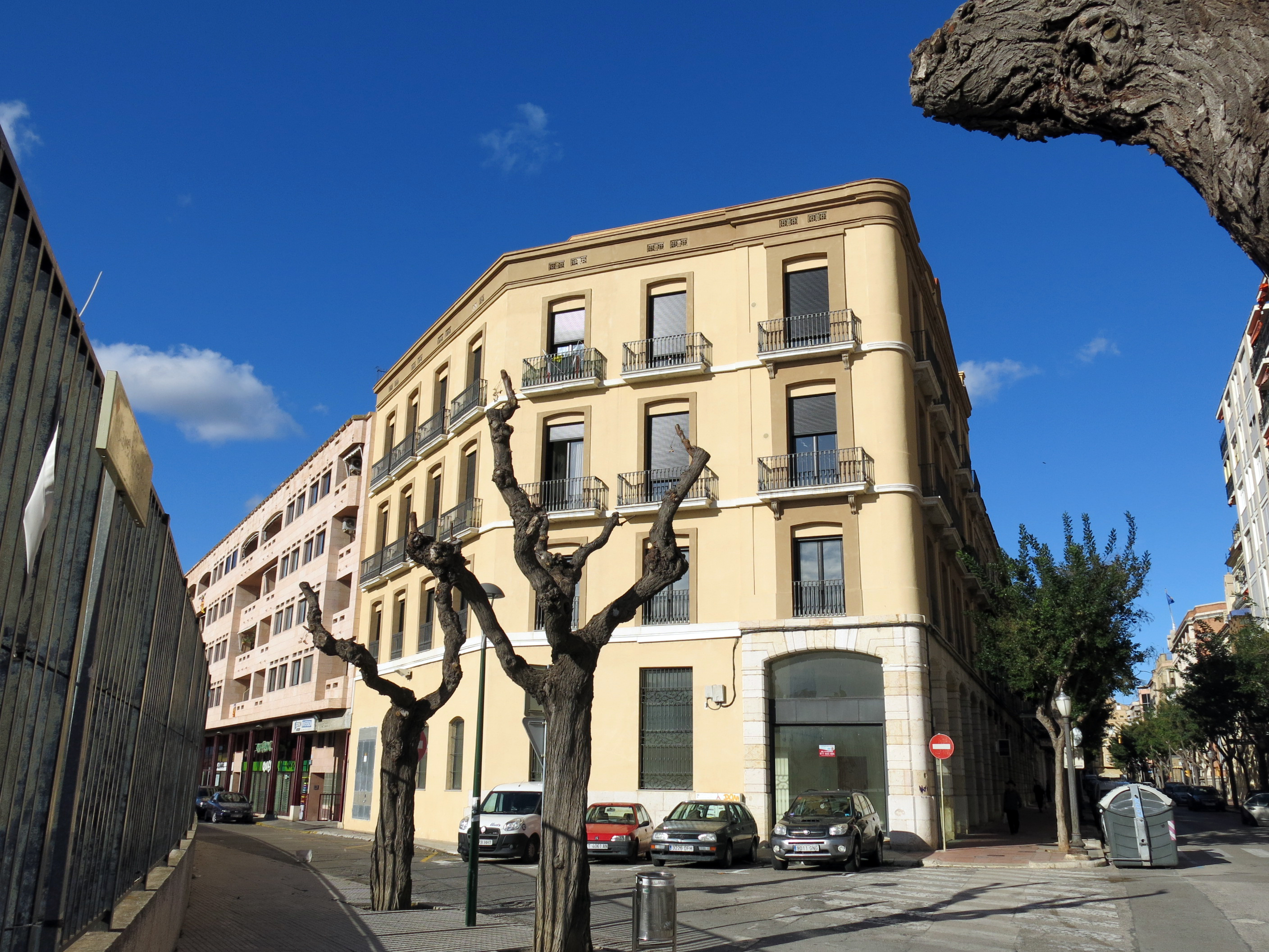 Casa Margenat (Tortosa)